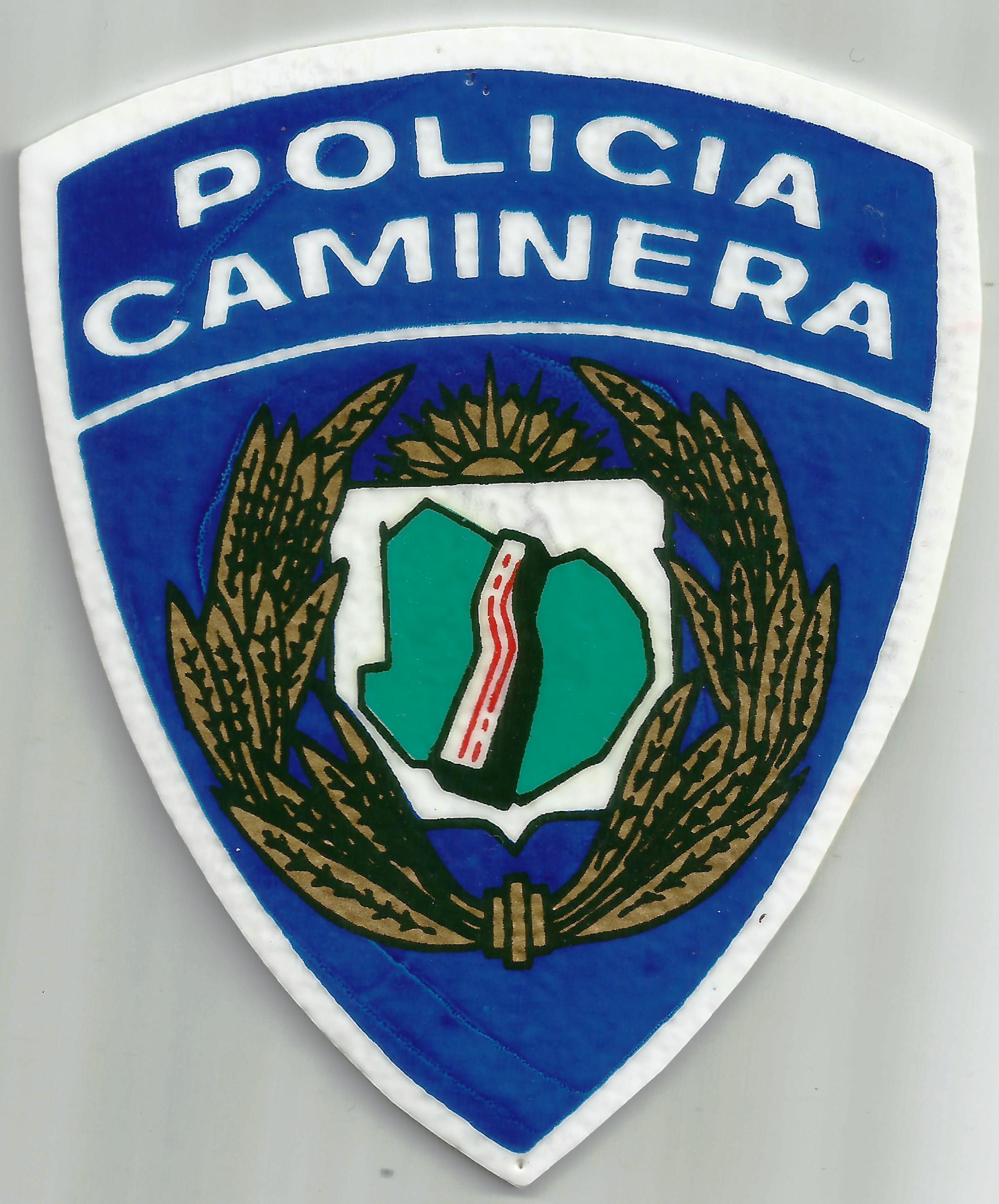 Politie embleem Uruguay